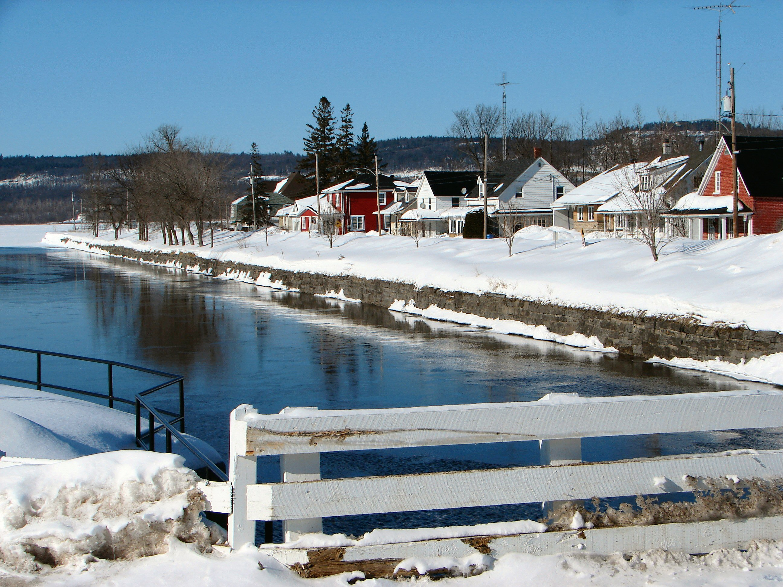 Grenville-sur-la-Rouge, Quebec, Canada